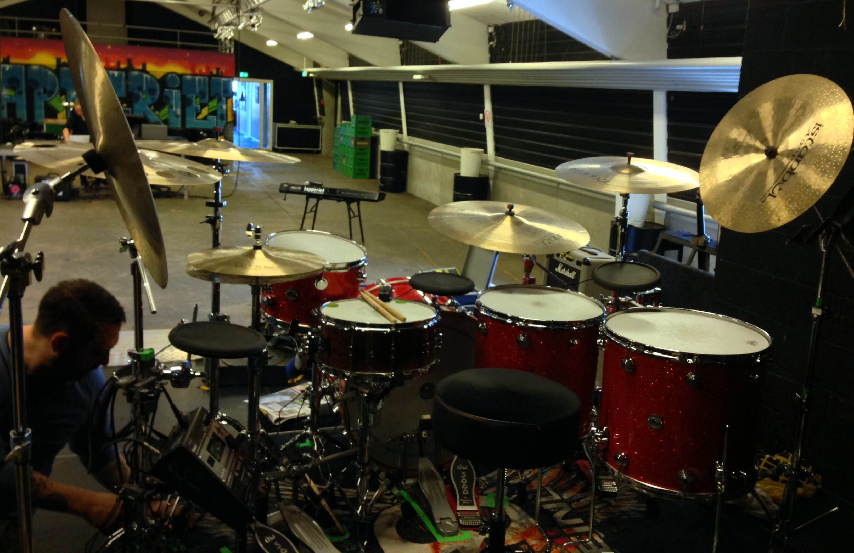 Trommeslager Morten Hellborns setup under Dúnés koncerter i 2013.